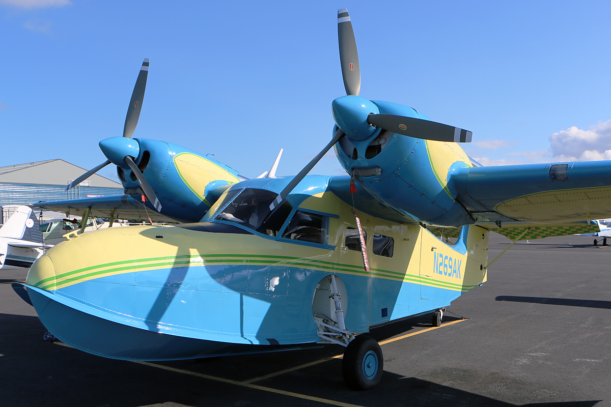 PAMR